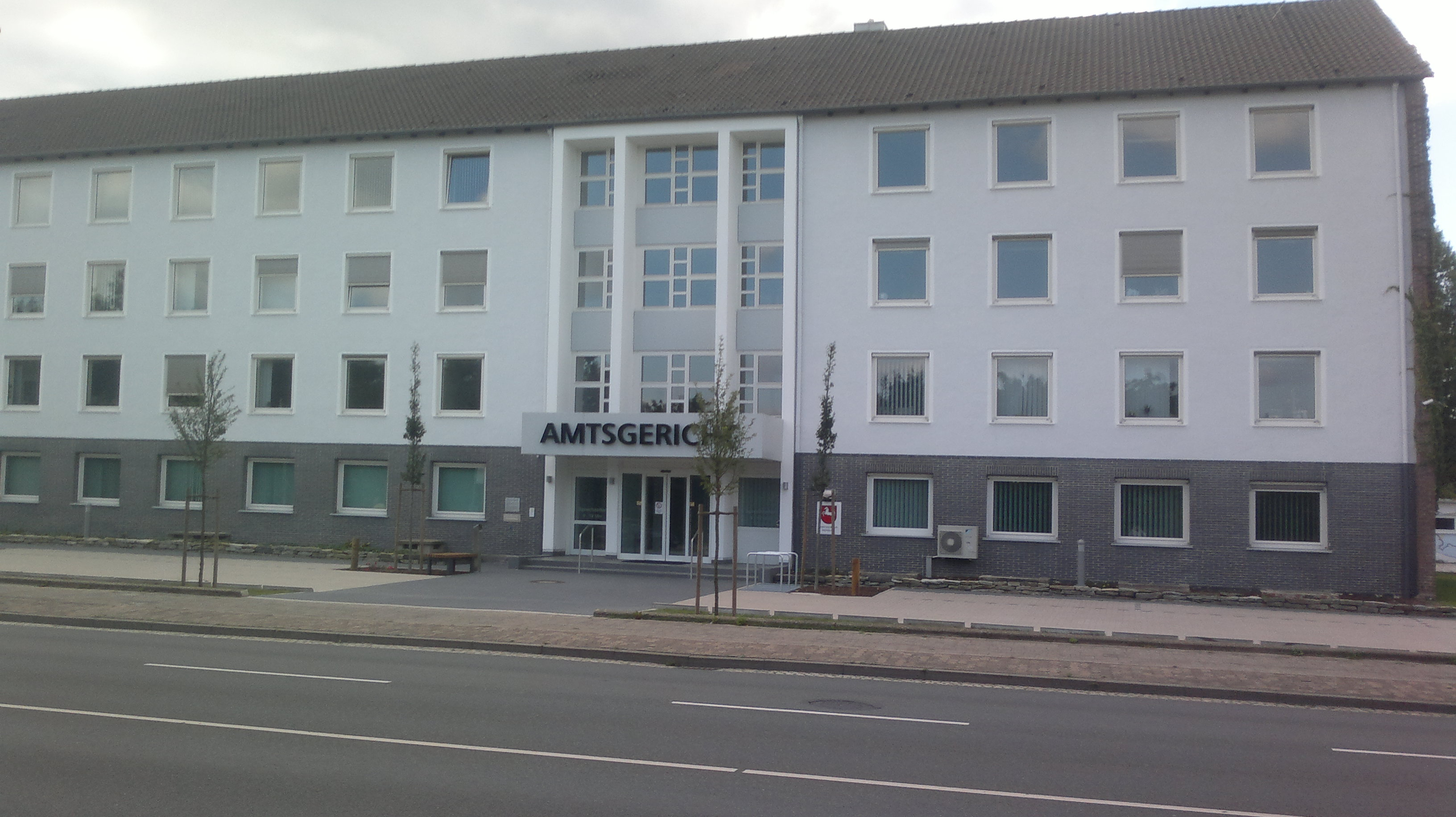 Amtsgericht Nienburg (ehemals Kreiswehrersatzamt)